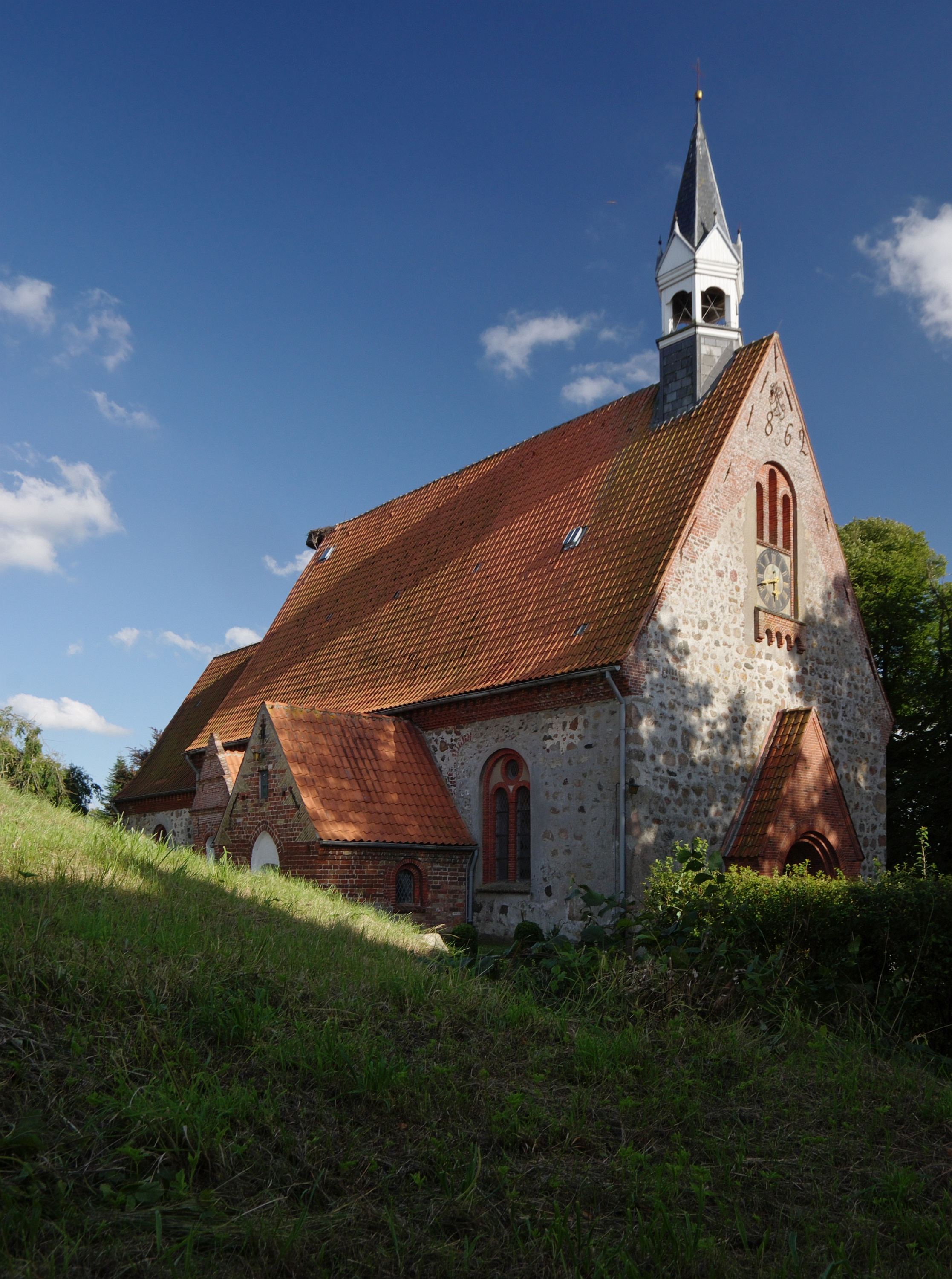 Schwabstedt, Schleswig-Holstein, Deutschland. Kirche